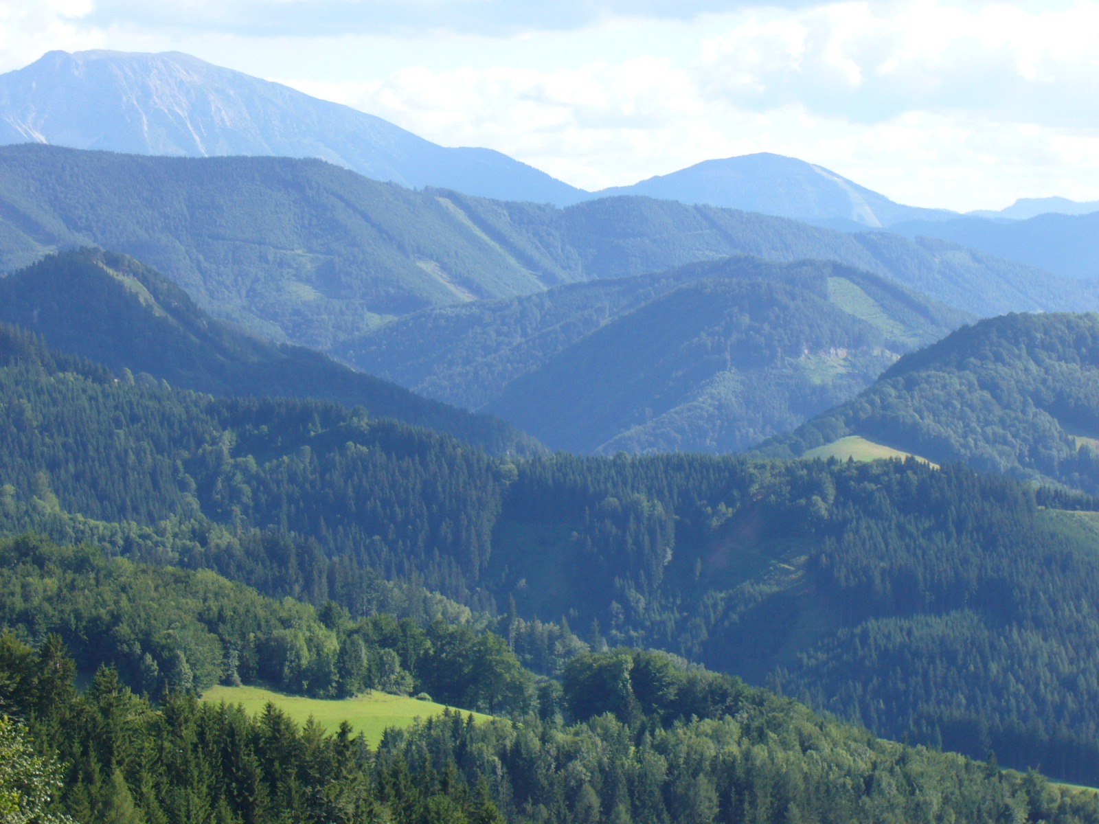 the eisenwurzen in lower austria